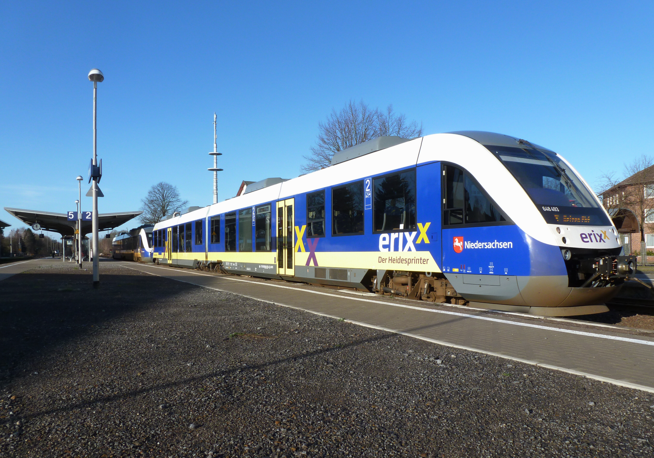 Ein Zug der Regionalbahn Erixx bei einem Halt auf dem Bahnhof Soltau, Niedersachsen.